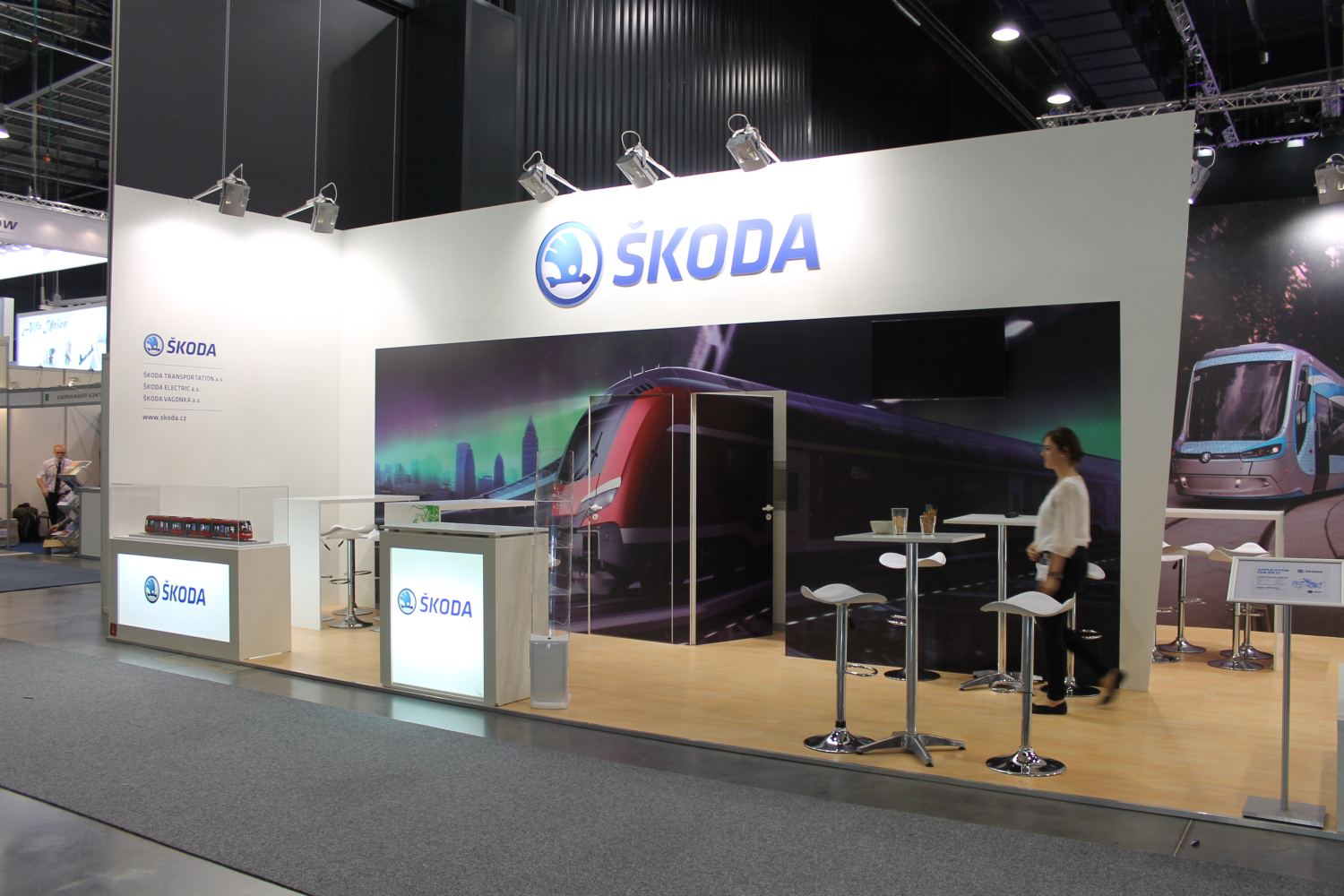 Stoisko Skody podczas targów Trako 2015. The making of this document was supported by Wikimedia Polska Association, within Wikigrant no. WG 2015-34. English | polski | +/−